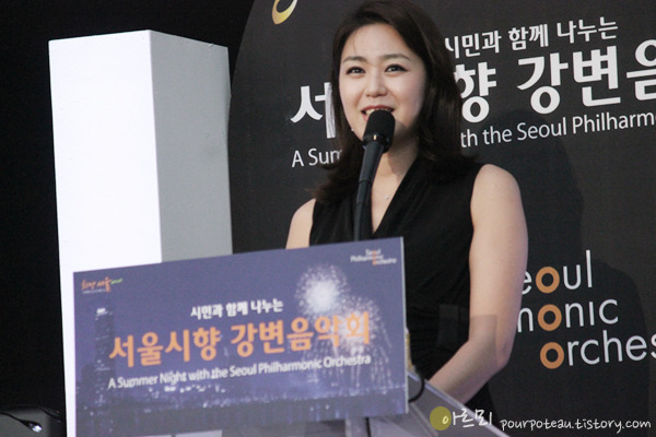 서울시향 강변음악회